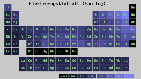 elektronegativiteit PS, eigen creatie